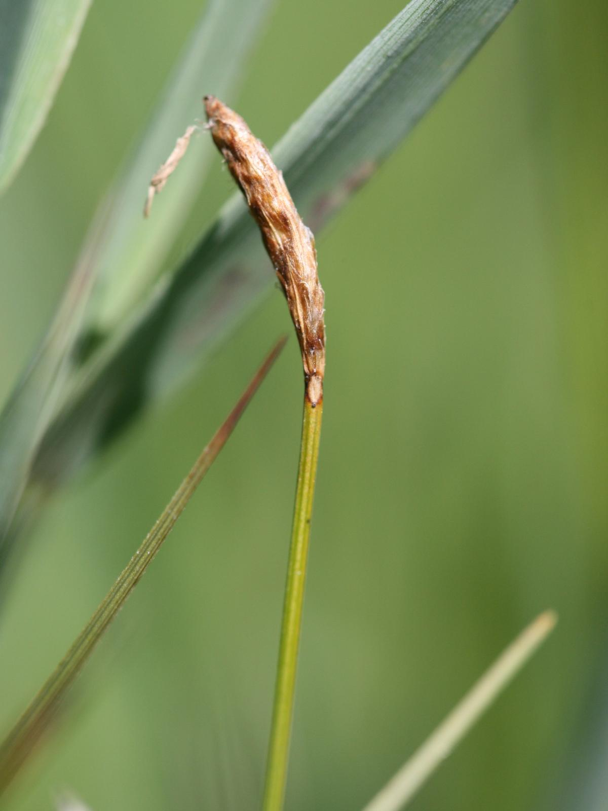 Zweihäusige Segge (Carex dioica), männliche Pflanze